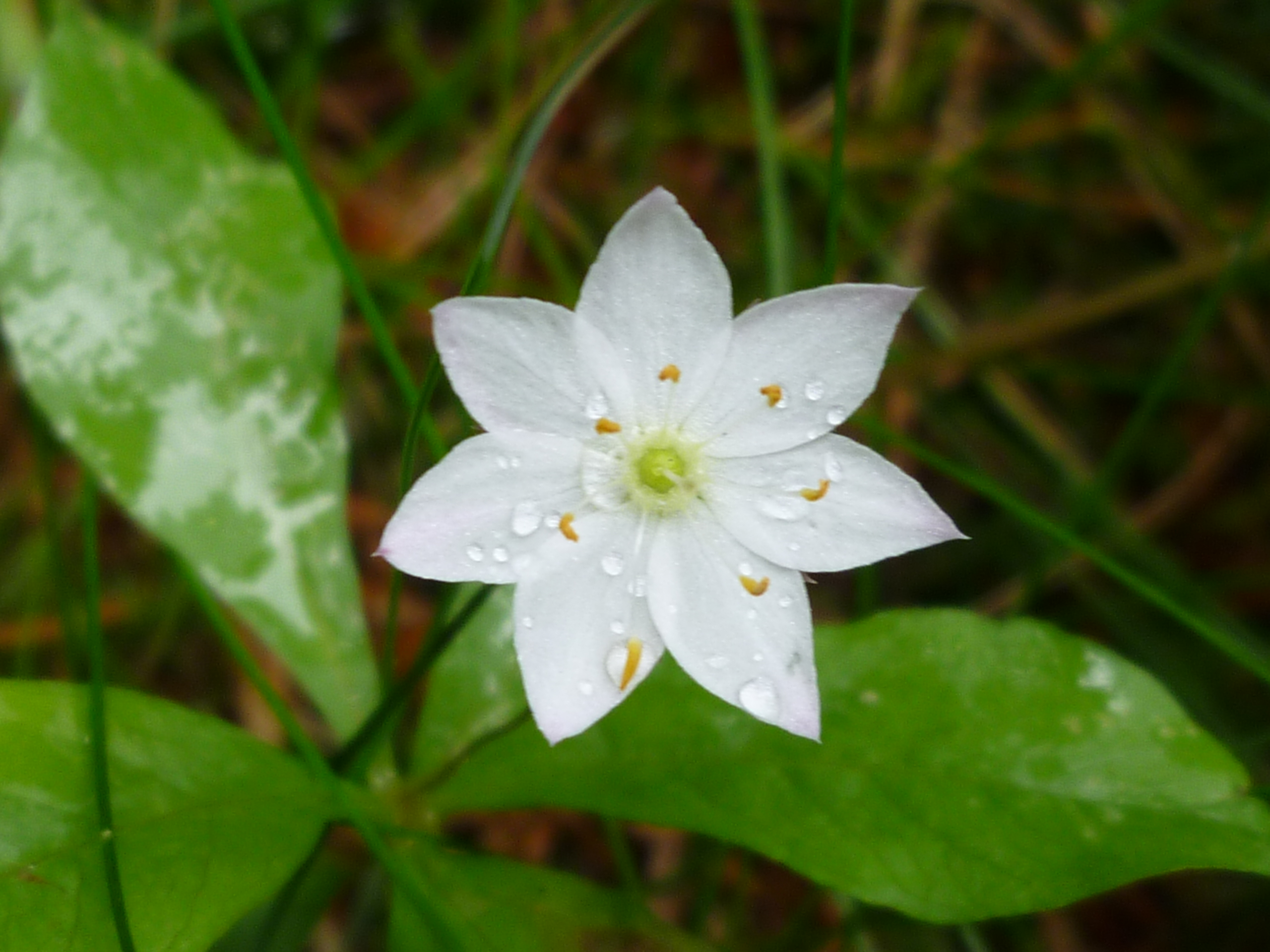 Europäischer Siebenstern im Gipfelbereich des Pröller bei Sankt Englmar. Der Siebenstern ist ein Relikt aus der letzten Eiszeit.